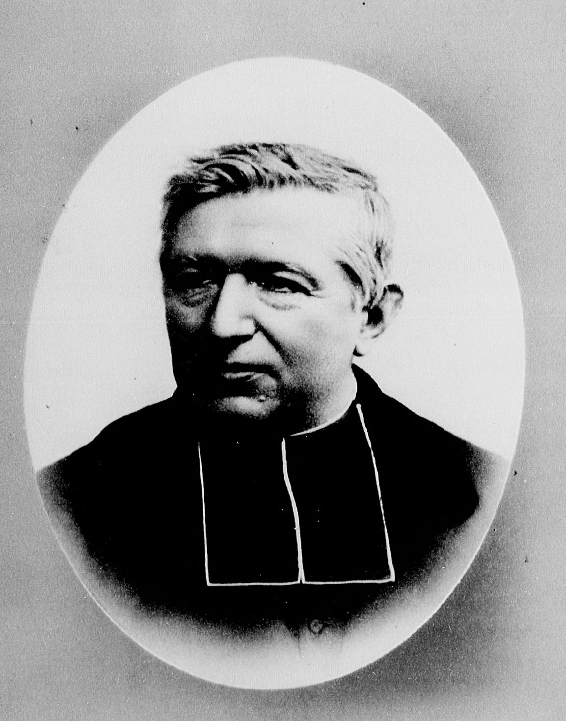 Abbé (Landelin) Winterer, Biographies alsaciennes avec portraits en photographie, série 3